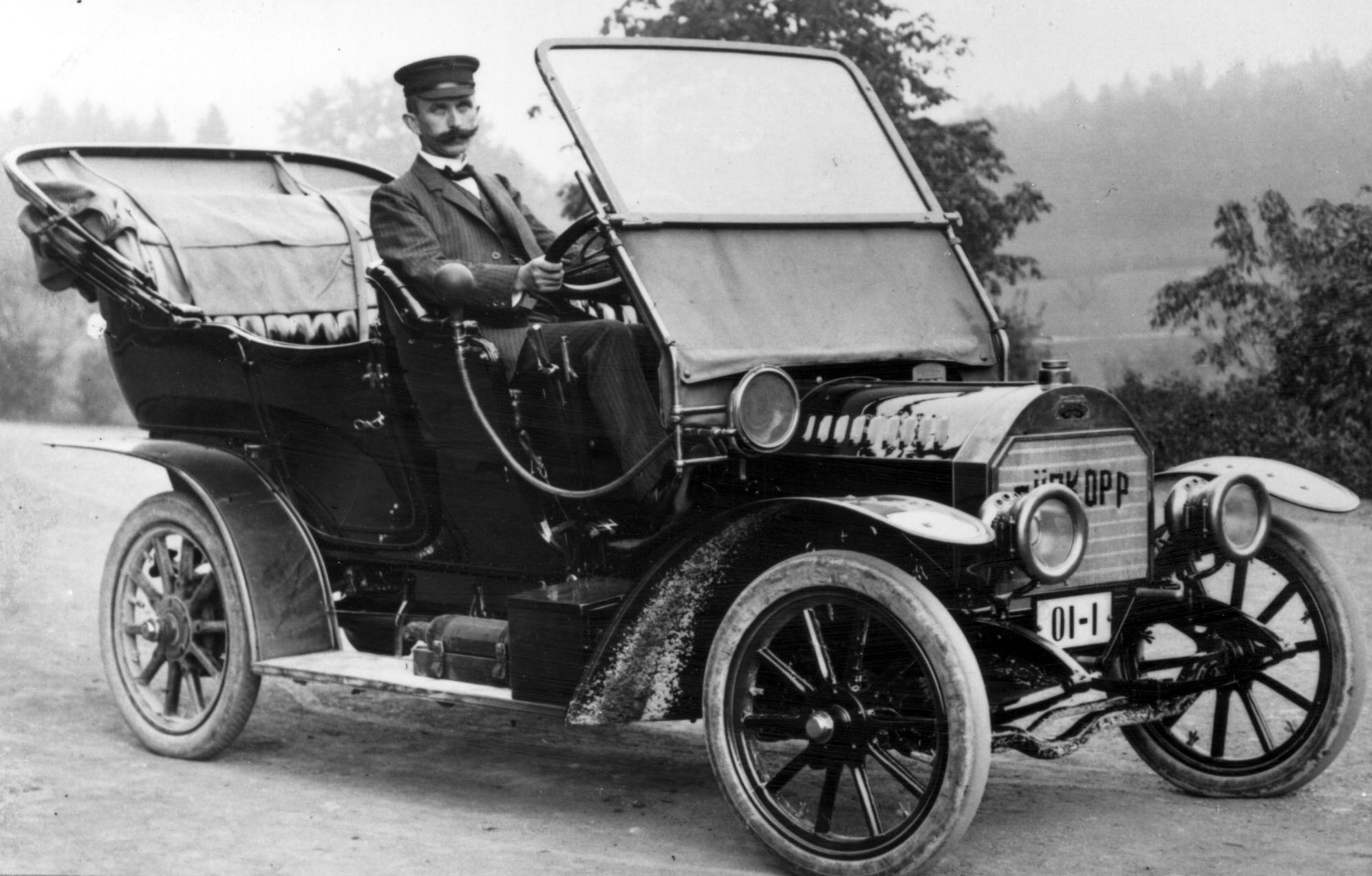 Premiere 1902. Für die Dürkopp-Werke in Bielefeld baute Wilhelm Karmann die erste Automobilkarosserie.